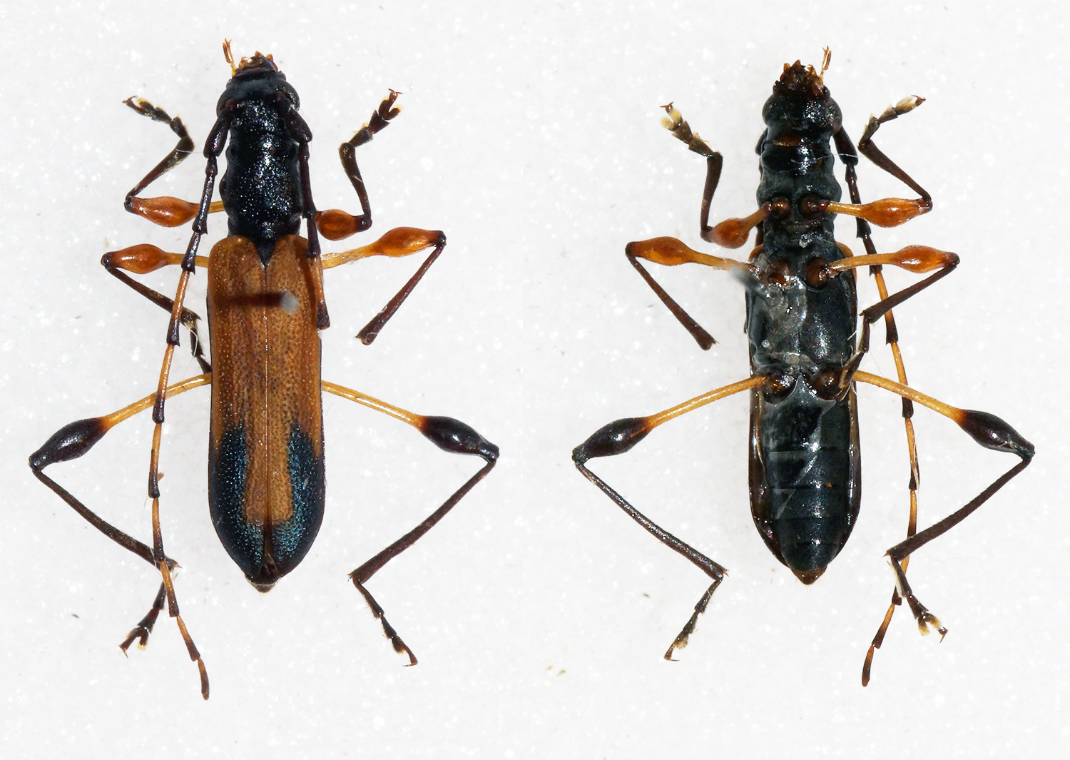 Distant,1904 Sex: Male Data: 09-12-10 - Cuacua Lodge 36m 8 km East of Caia - Zambezi River - Mozambique Size: 9mm